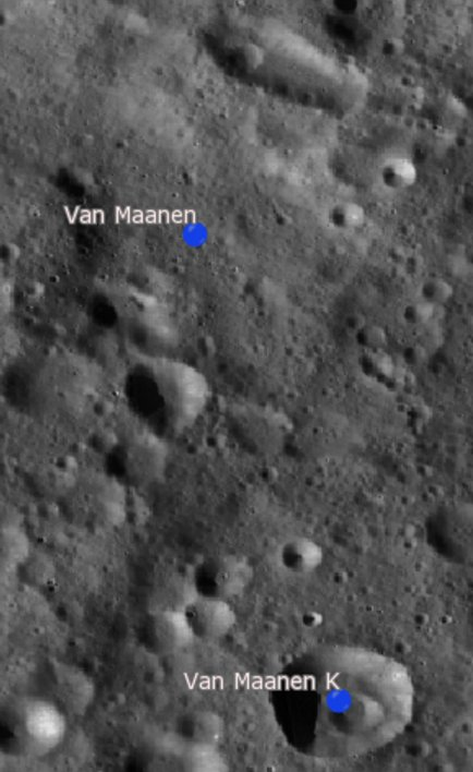 Cráter lunar Van Maanen. Cráteres satélite. (Imagen LRO)